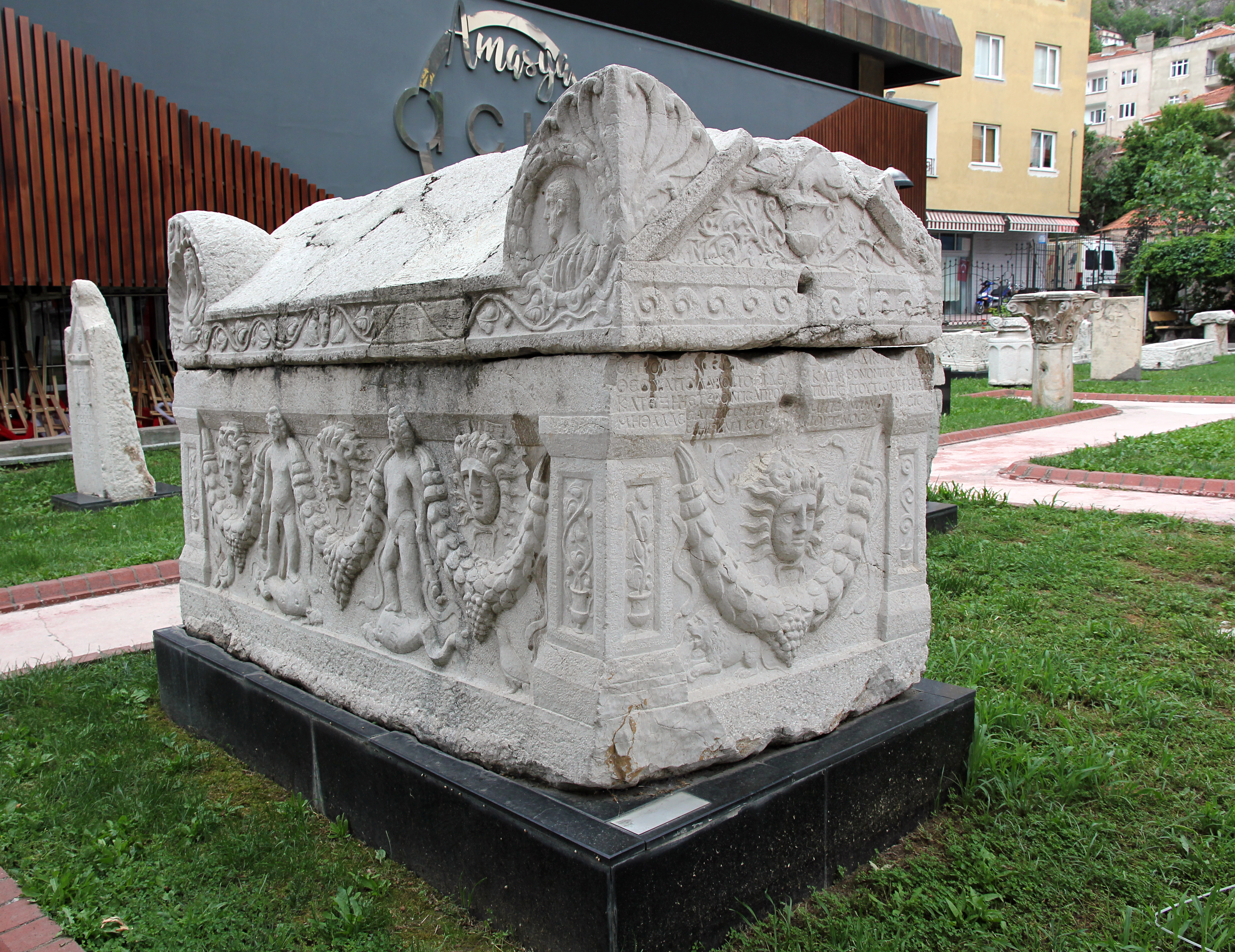 Archäologisches Museum Amasya, Nordtürkei, Sarkophag im Außenbereich